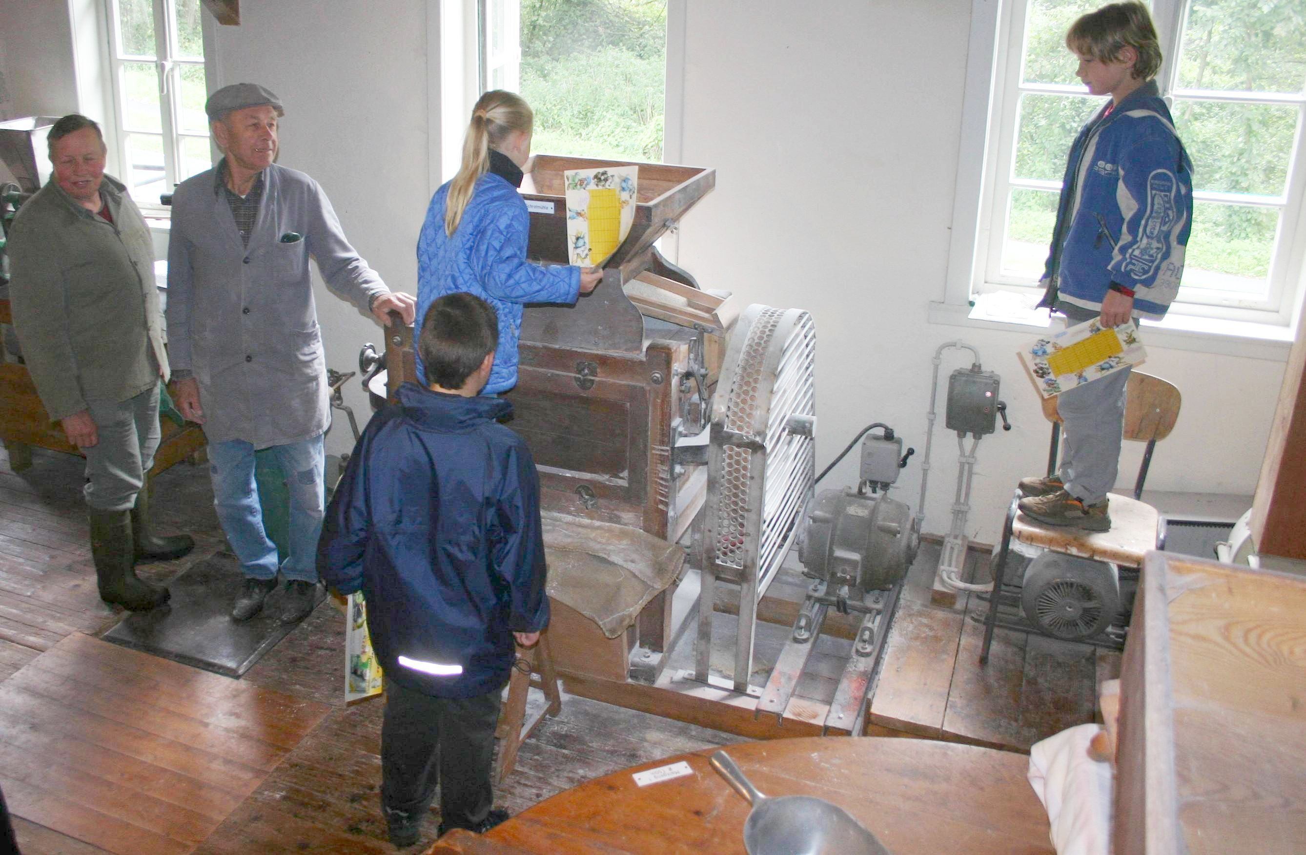 Mahlen von Getreide in der Wassermühle Deelbrügge